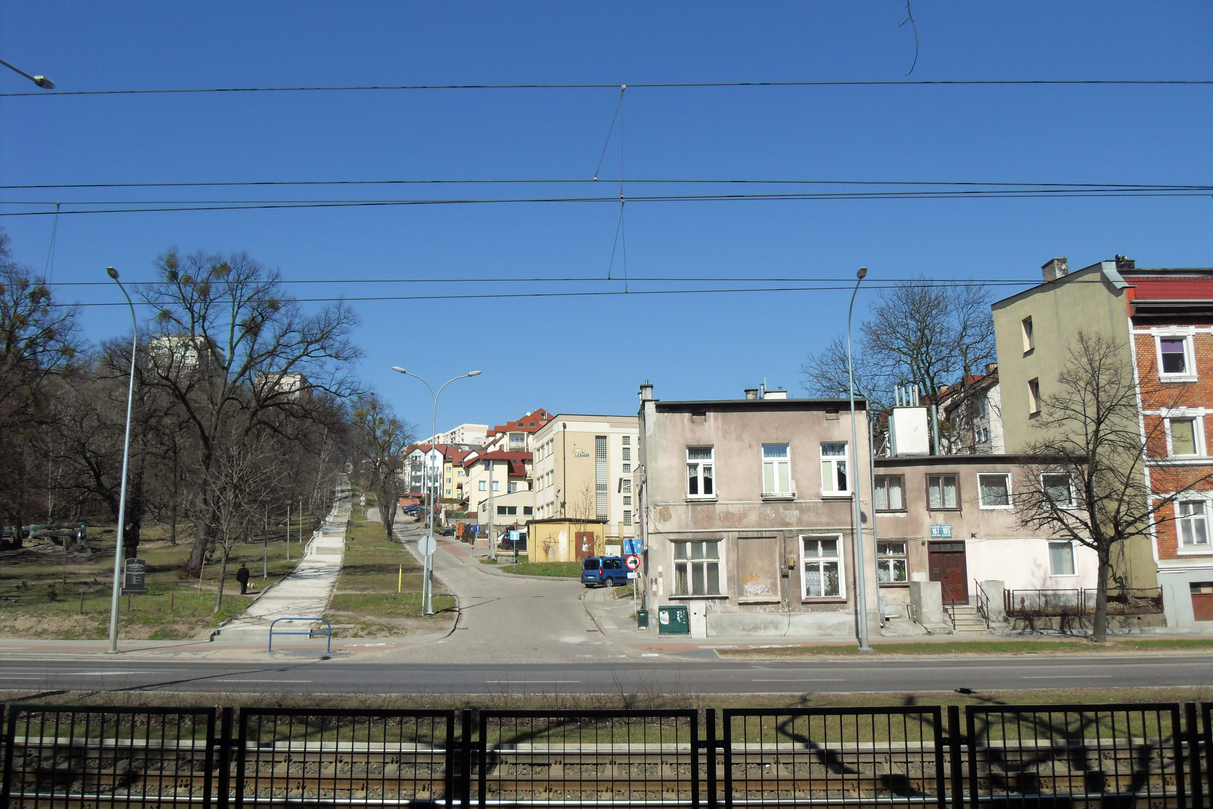 Gdańsk Siedlce, skrzyżowanie ul. Kartuskiej i ul. Starodworskiej.